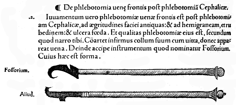 Abbildung von Aderlassmessern